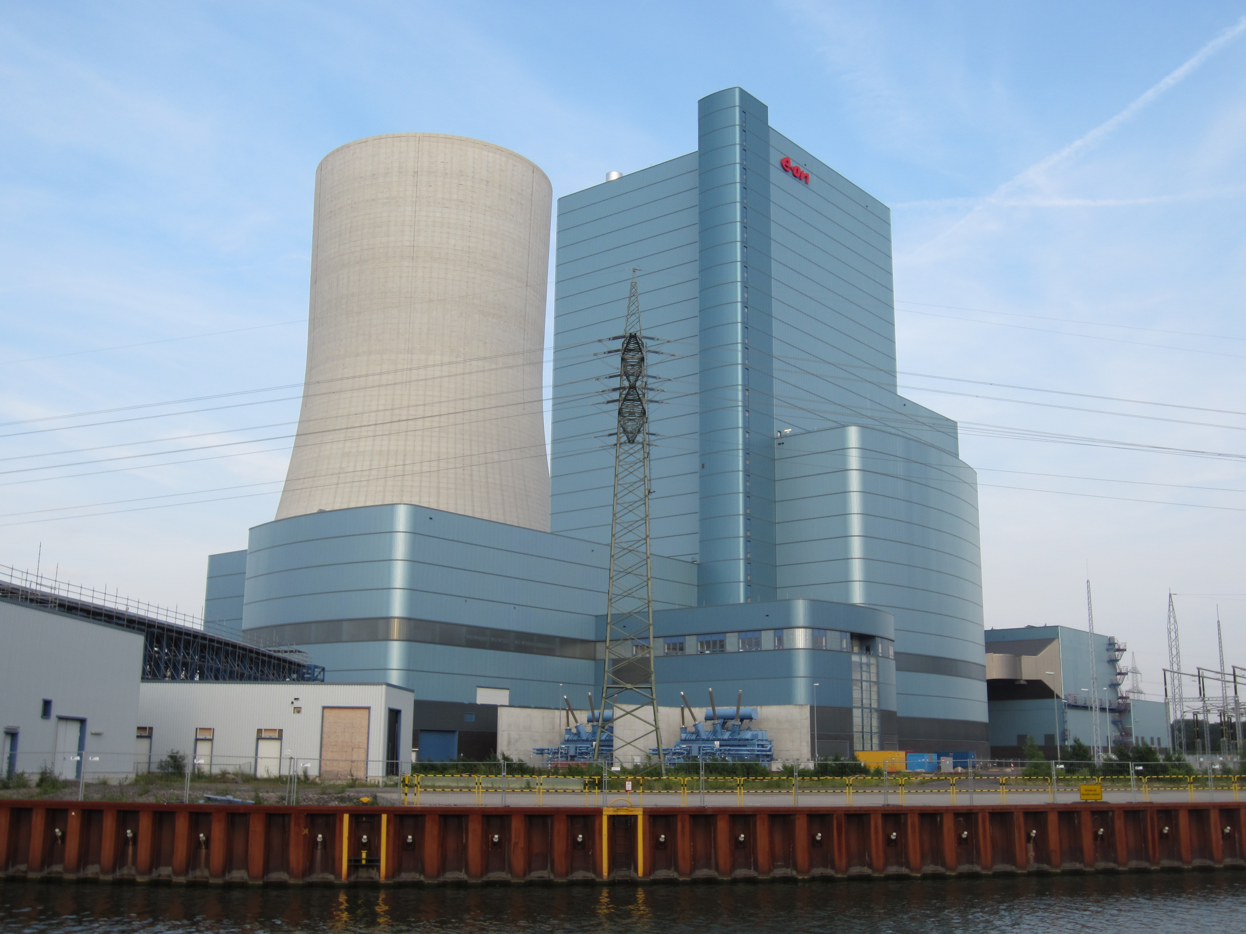 Das Kraftwerk Datteln mit dem Neubau Datteln IV